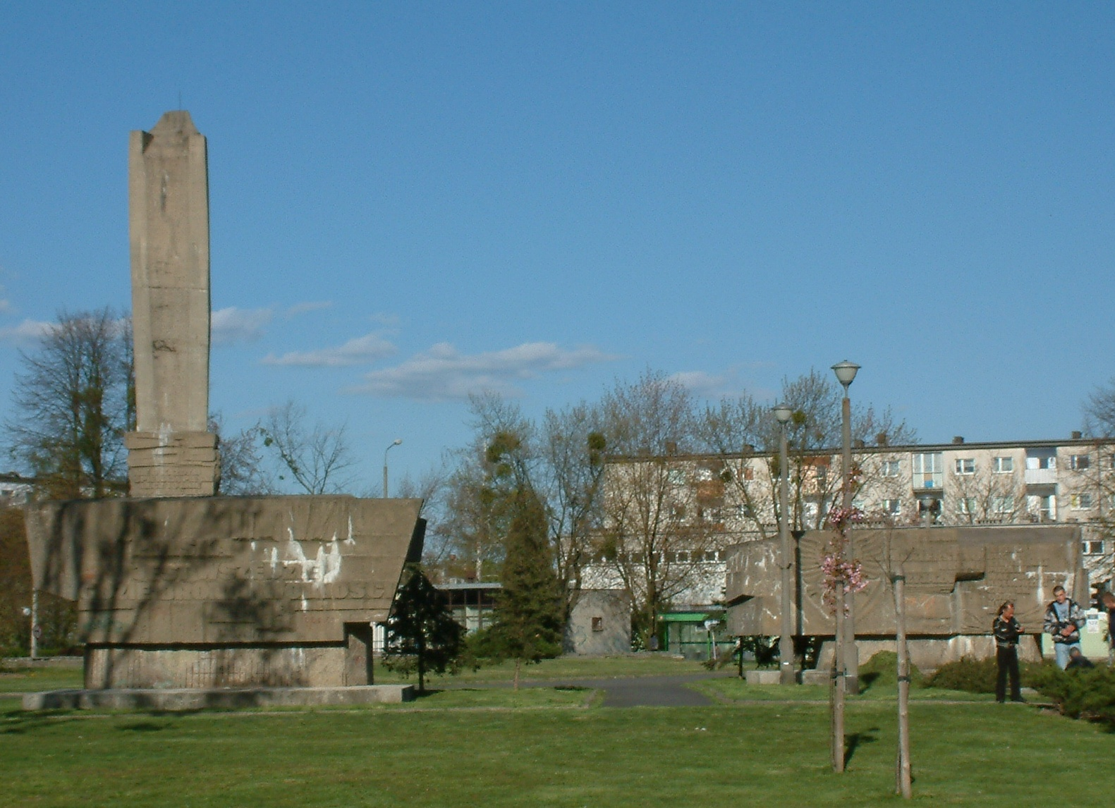 Monument of Karol Świerczewski i Poznań